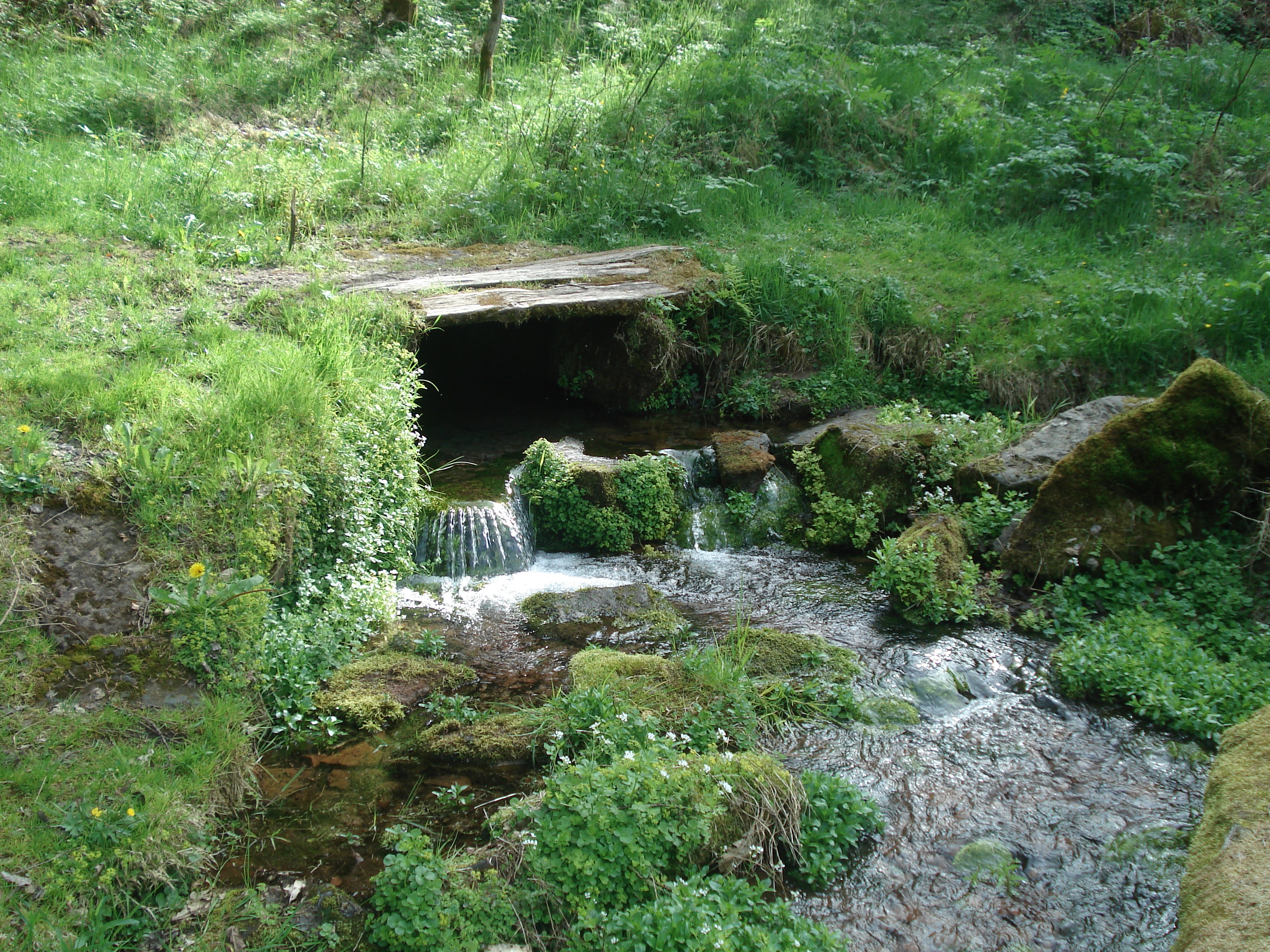 Der Steinbrunnen bei Weibersbrunn. Der abfließende Bach mündet in den Steinbach (Weibersbach)